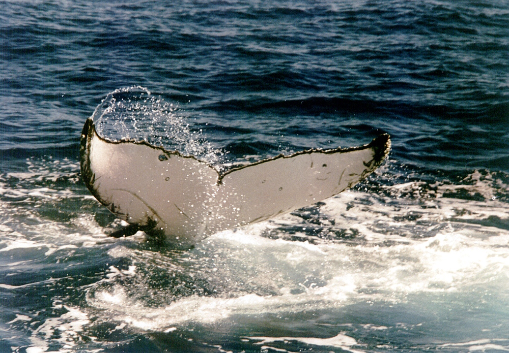 Schwanzflosse eines jungen Buckelwals (Megaptera novaeangliae) – Vgl. Buckelwal Nahaufnahme.jpg (Maul des selben Wals)